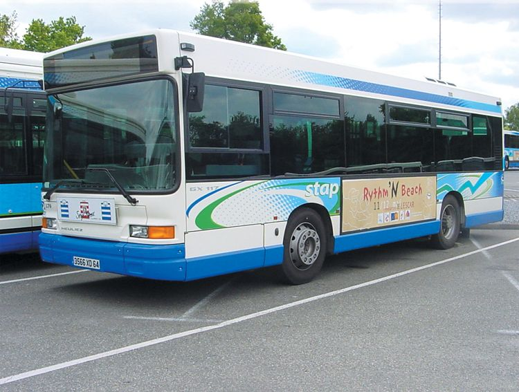 Photo d'un bus de la Stap